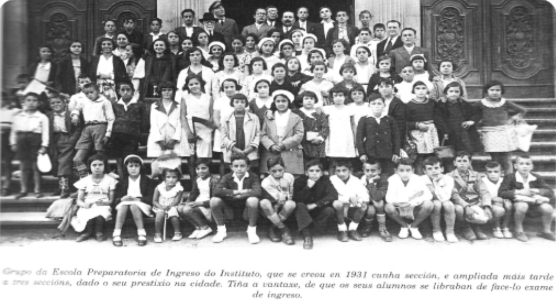 Arriba, á dereita, con traxe escuro e garabata, Paulo Novás co alumnado do Instituto